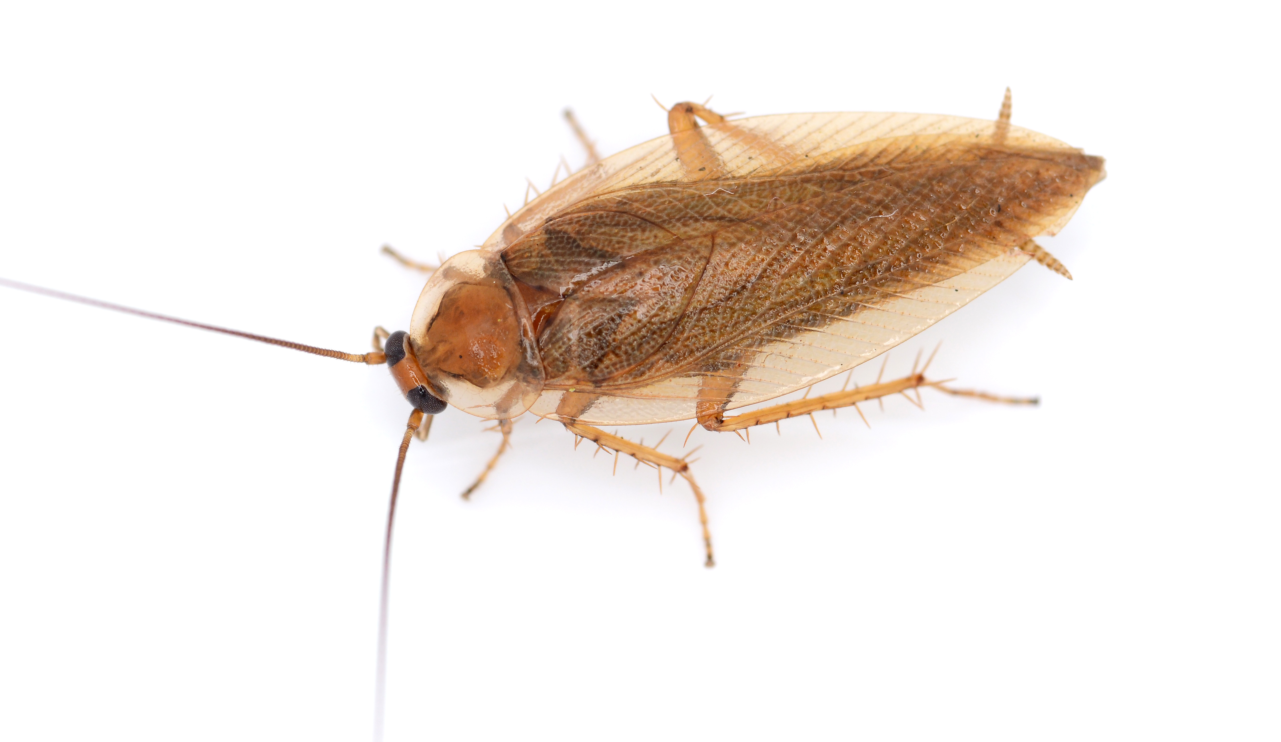 Ectobius vittiventris - A. Costa, 1847